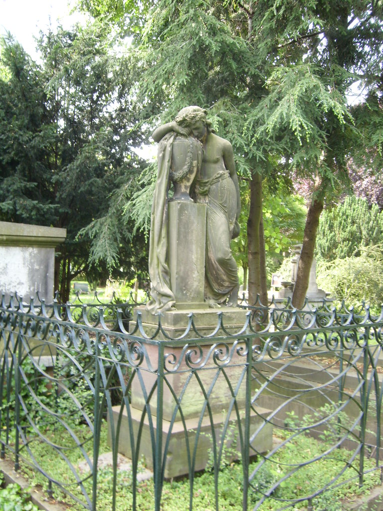 Grabmal Meder (†1798) auf dem Friedhof von St. Lorenz gefertigt von Ludwig Daniel Heyd in Kassel